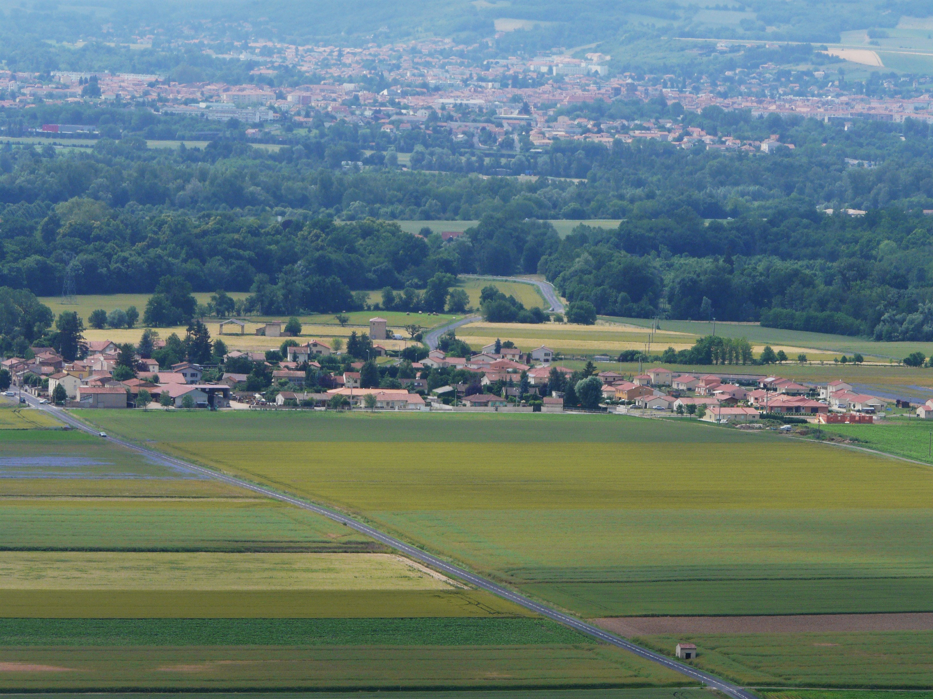 Le village de Varennes-sur-Usson vu depuis Usson, Puy-de-Dôme, France.